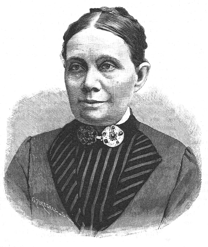 Eva Wigström (1832-1901)